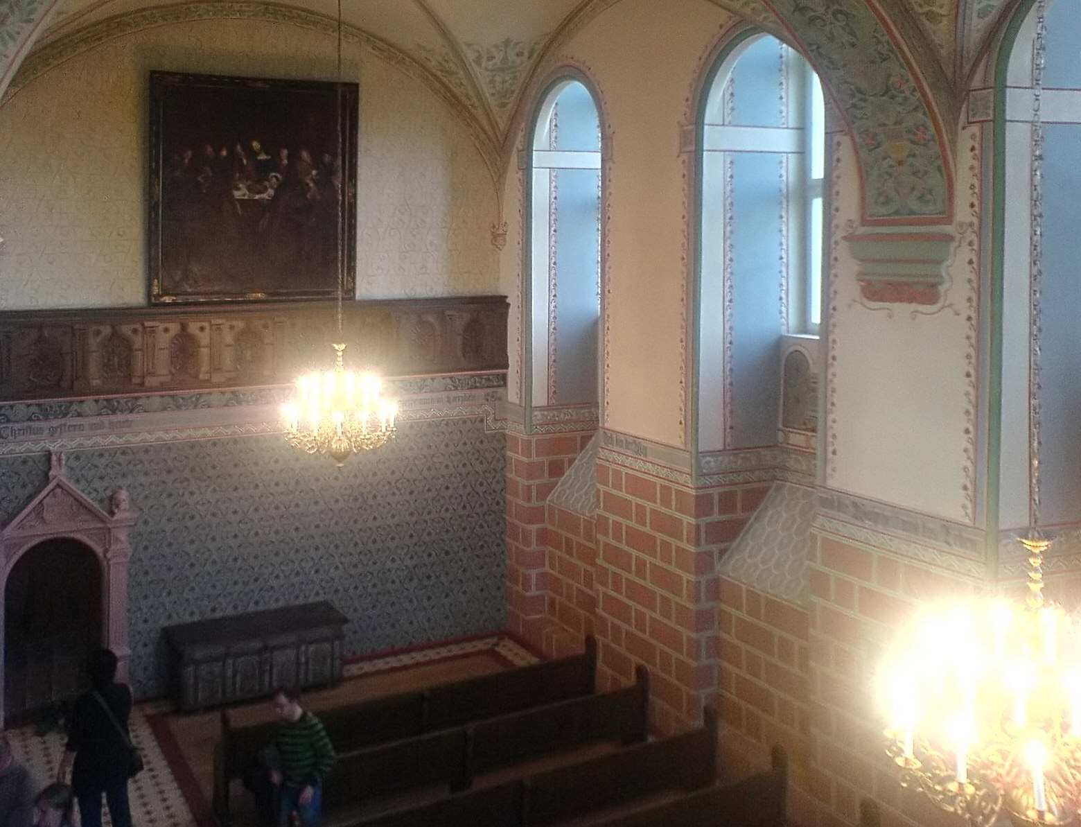 Schlosskapelle_Plön